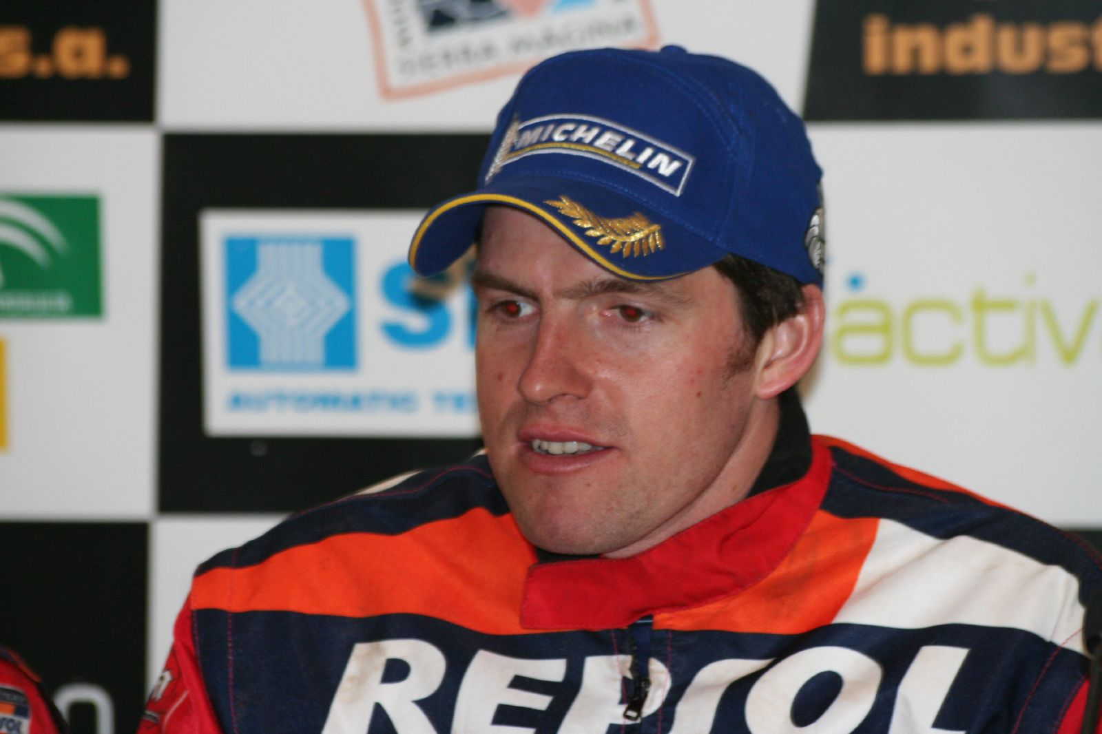 Todo un campeón..